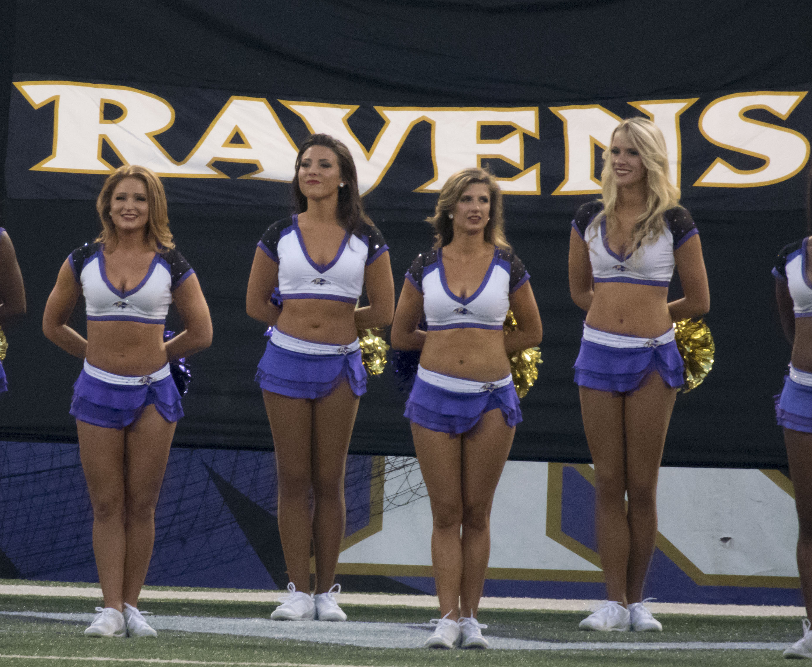 Redskins at Ravens 8/29/15